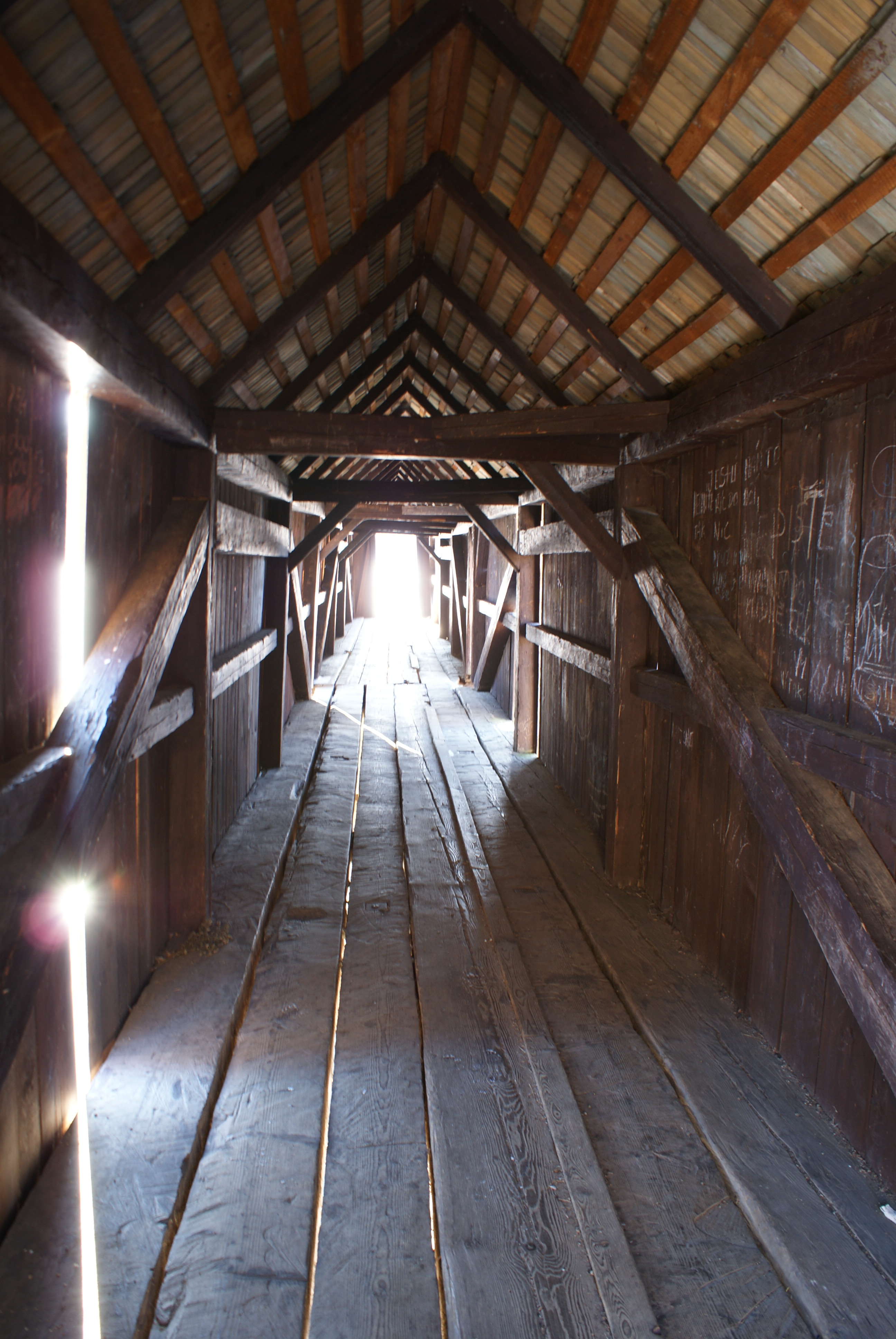 Rechle, Lenora. Na Teplé Vltavě.